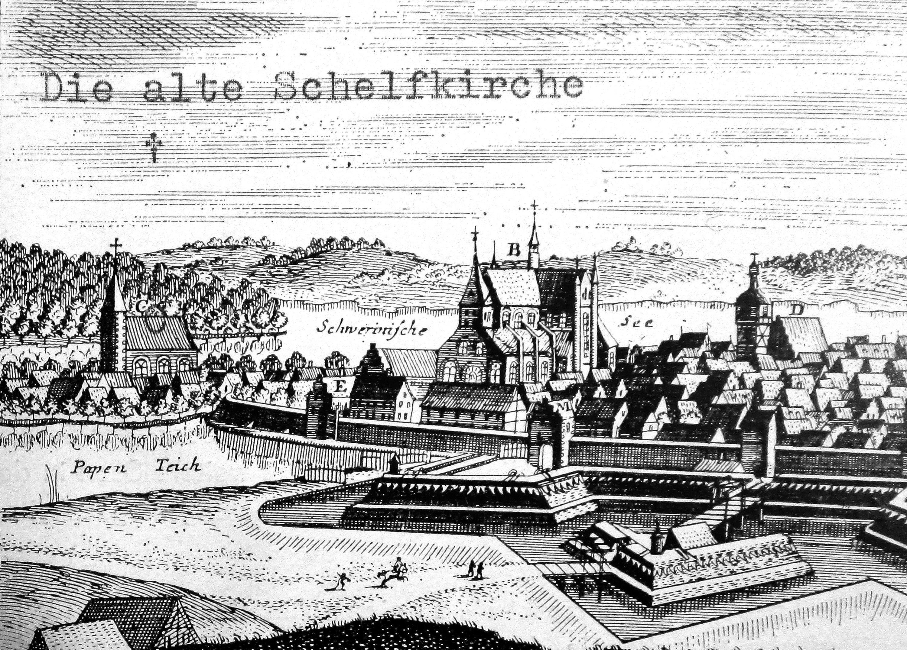 Ansicht der Stadt Schwerin mit der Schelfkirche anno 1640 (Ausschnitt).